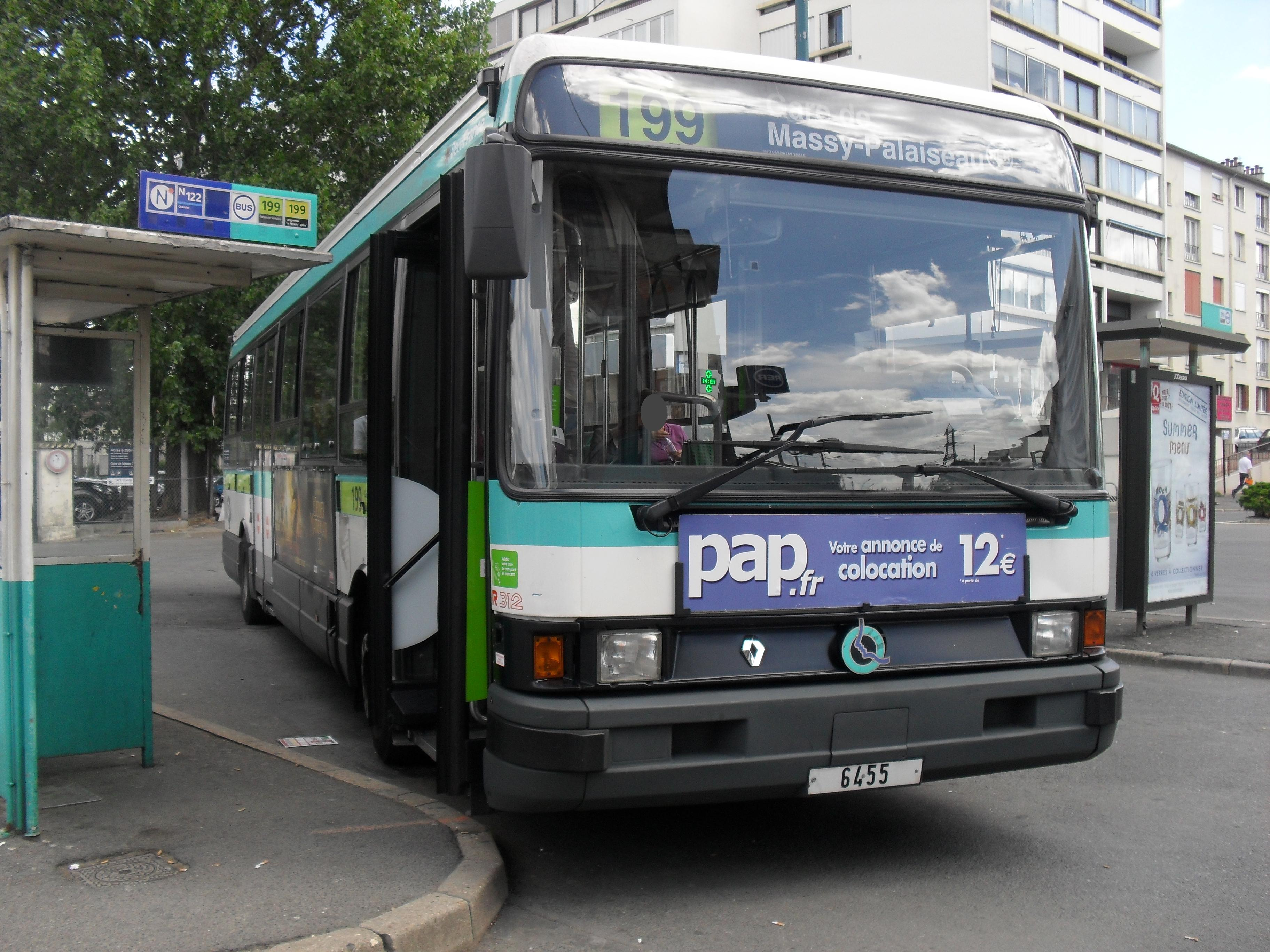 Ligne RATP 199